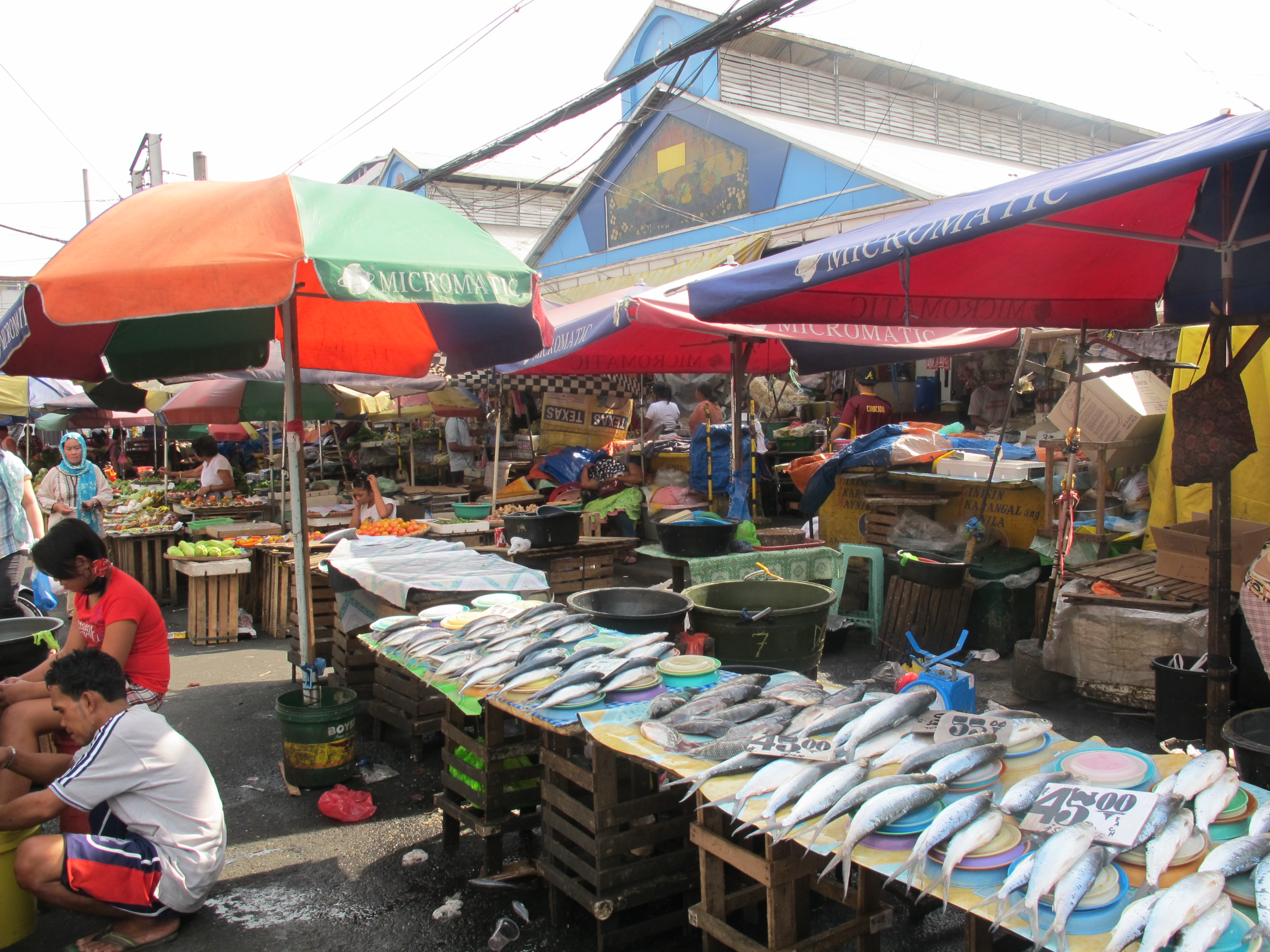 Quinta Market in Manila, Philippines